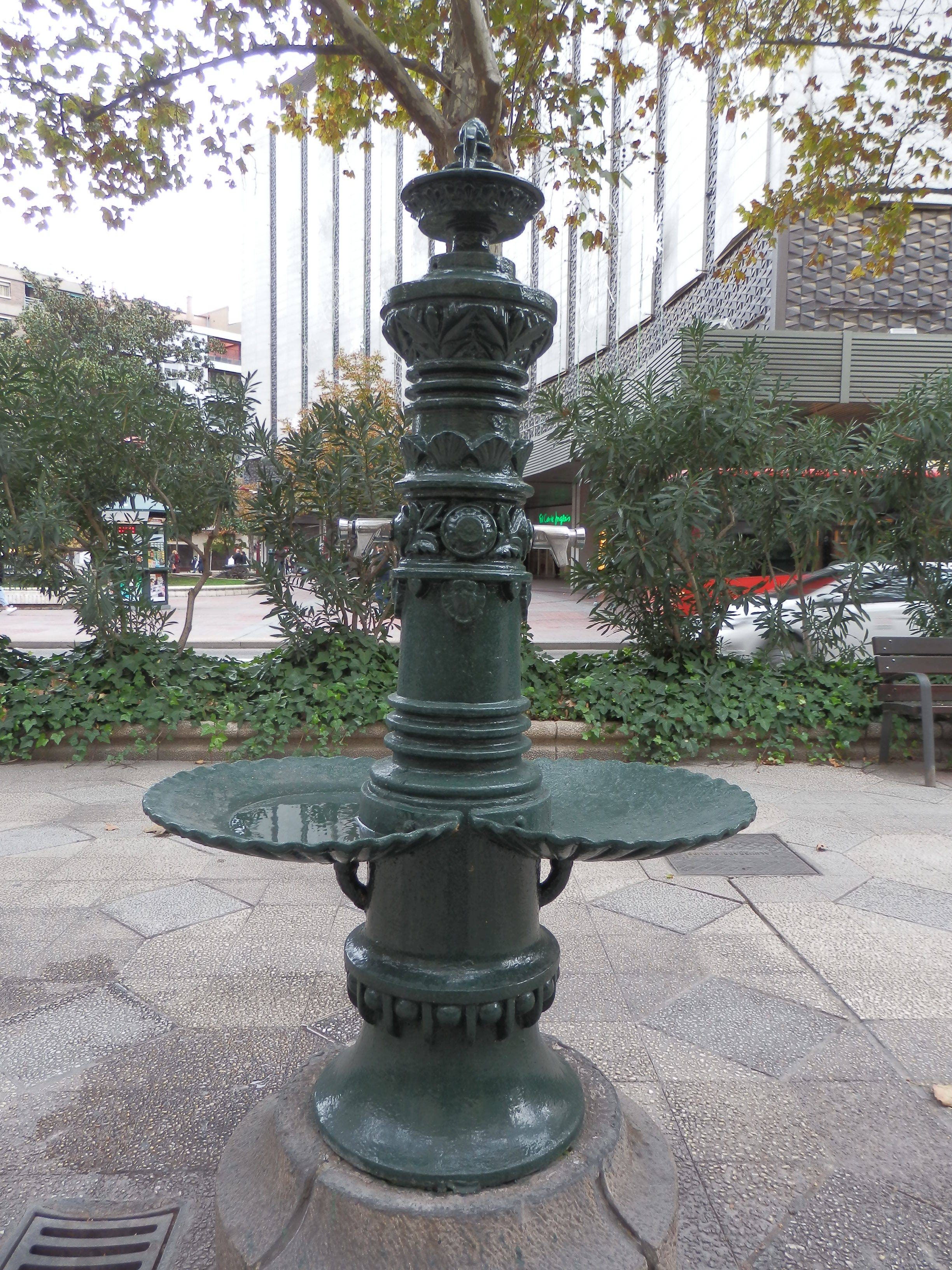 Fuente de beber de hierro fundido realizada por Averly.